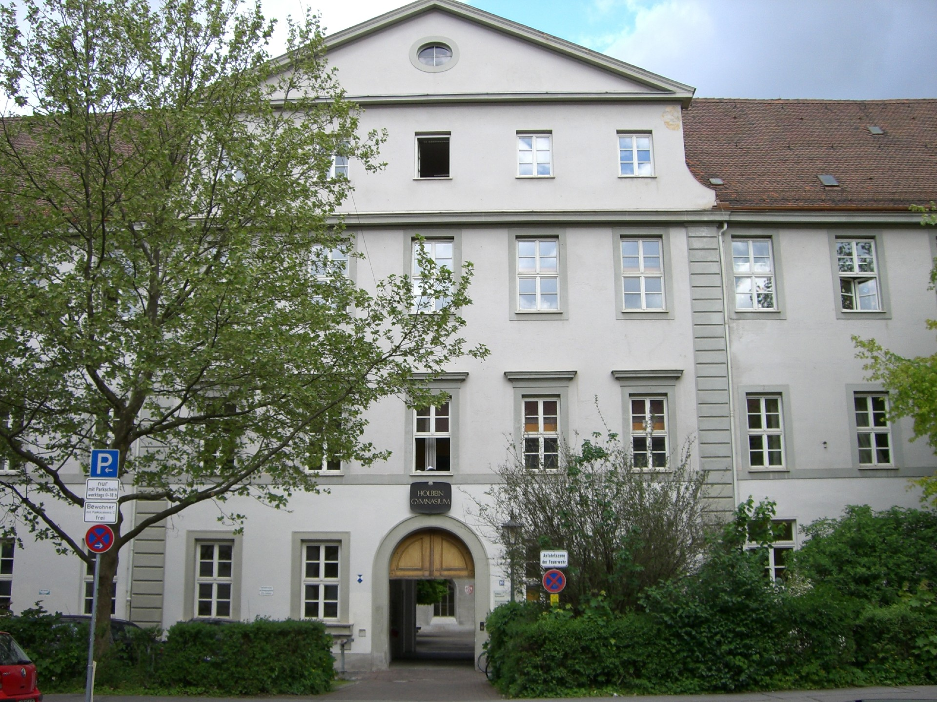 Der Altbau des Holbein-Gymnasiums Augsburg